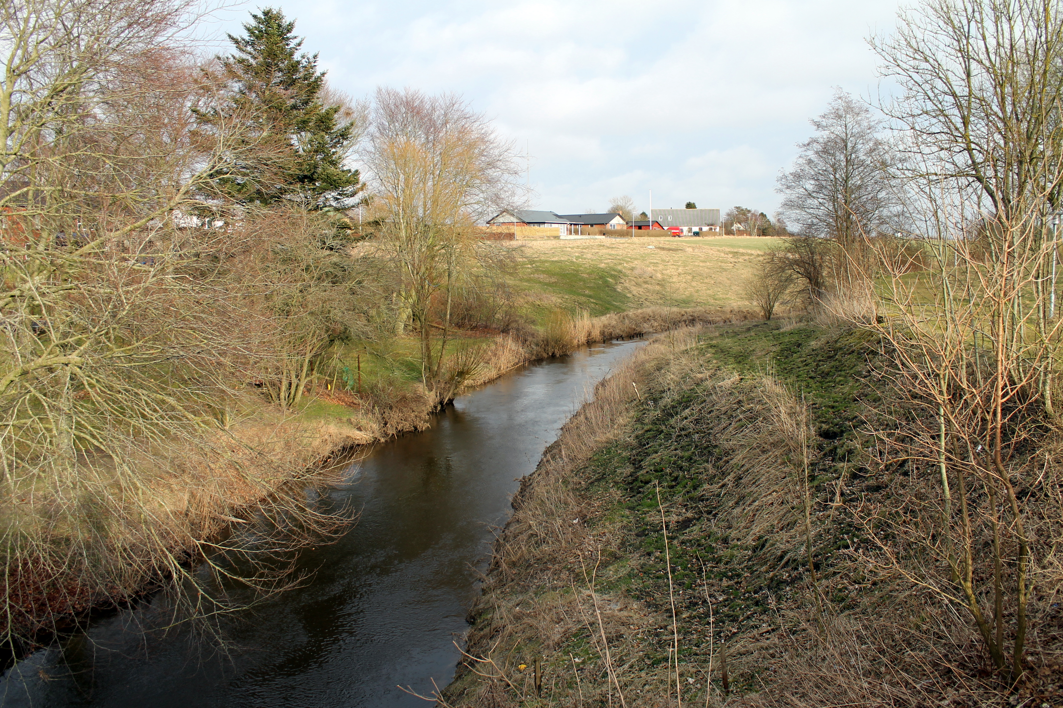 Uggerby Å ved Uggerby